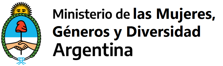 Ministerio de las Mujeres, Géneros y Diversidad